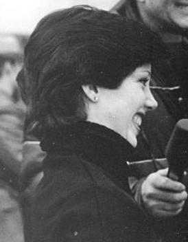 ADN-ZB /Thieme-11.2.80 Olympia-Lake Placid: Die Weltmeisterin und die Vizeweltmeisterin im Eiskunstlaufen Linda Fratianne (USA/l.) und Anett Pötzsch (DDR/r.) geben Heinz-Florian Oertel vom DDR-Fernsehen ein Interview.